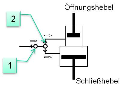 HVA-Grundkreisstellung